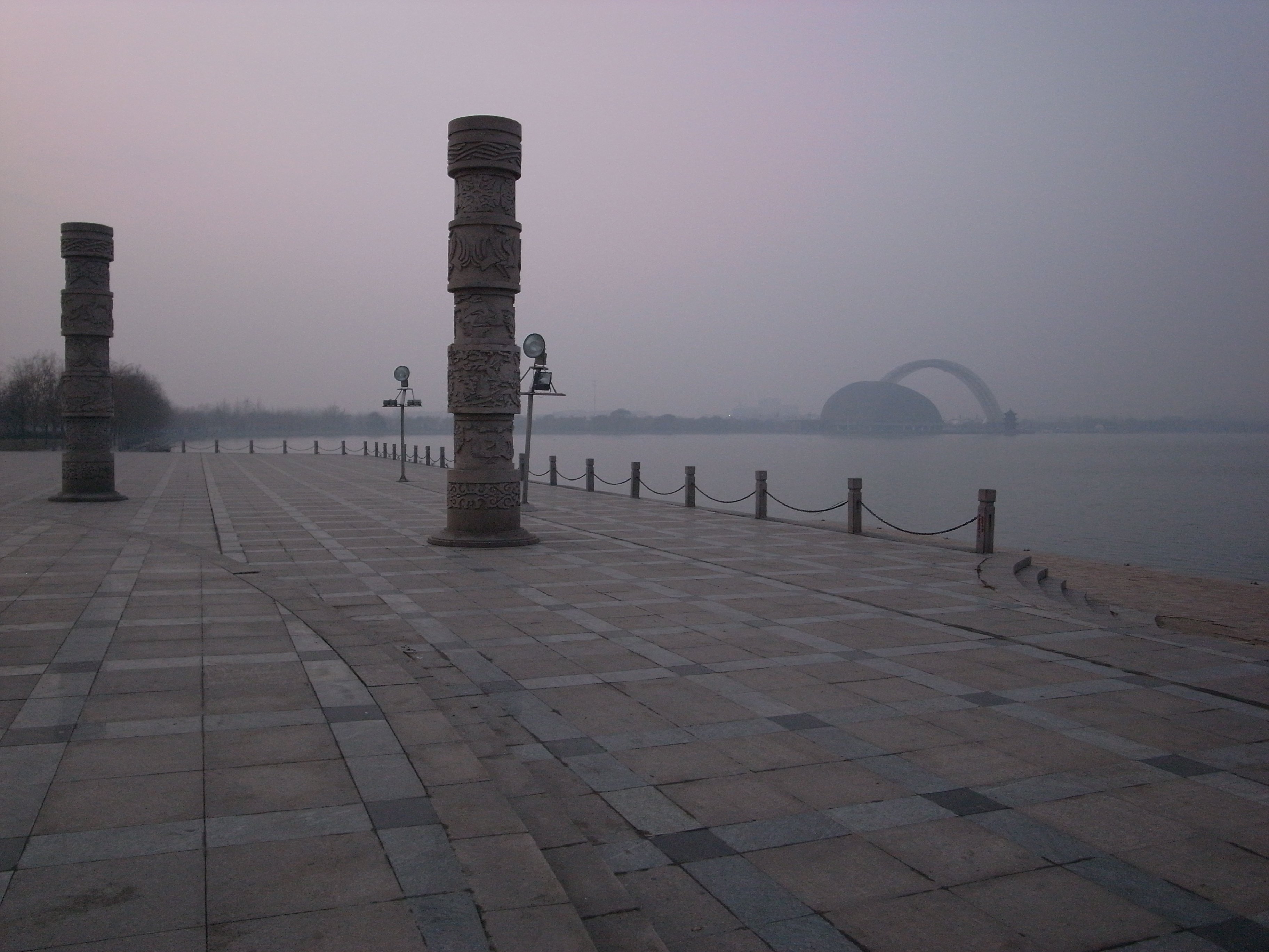 山东省聊城市东昌湖